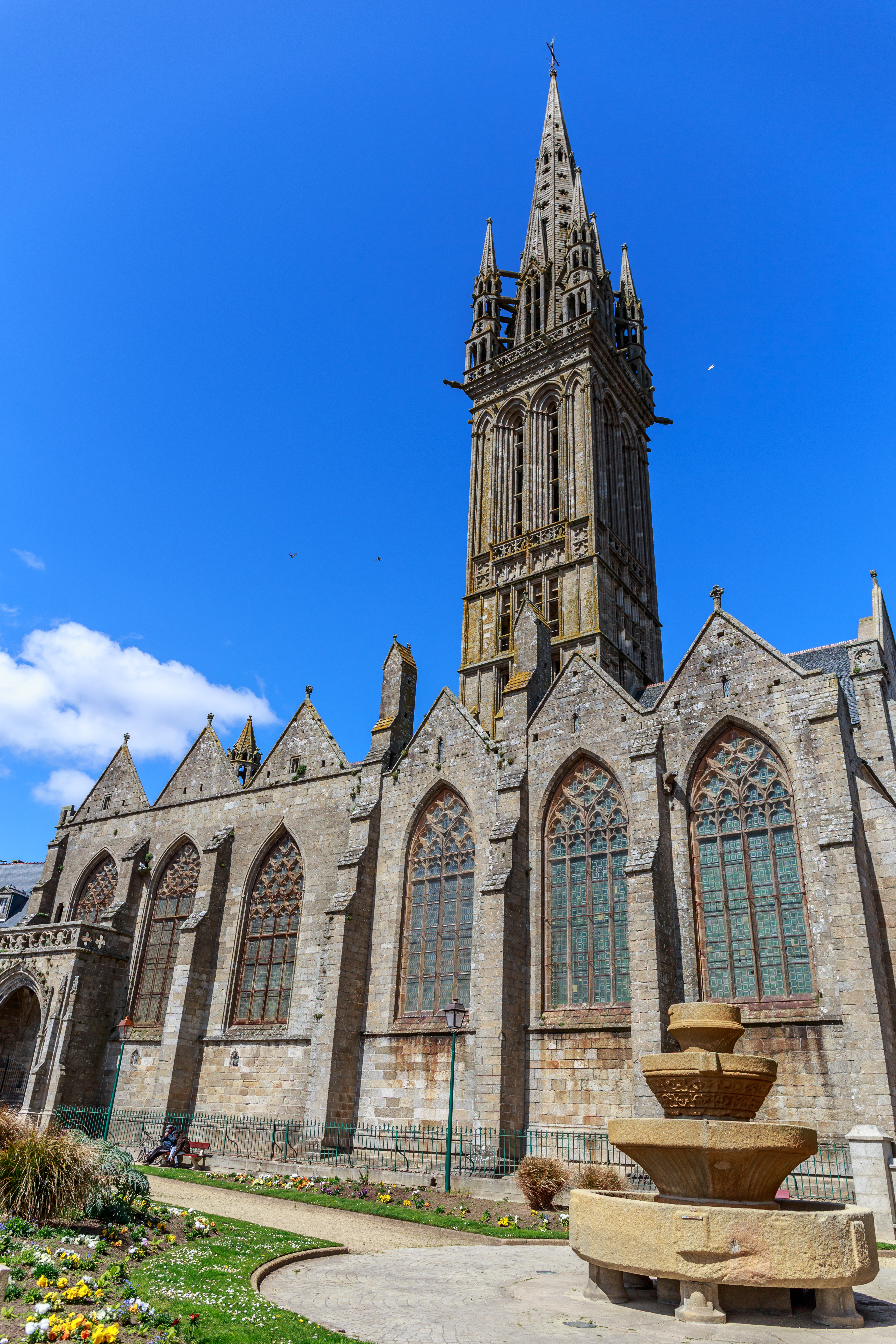 Côté Sud de la chapelle du Kreisker à Saint-Pol-de-Léon (Finistère, Bretagne).